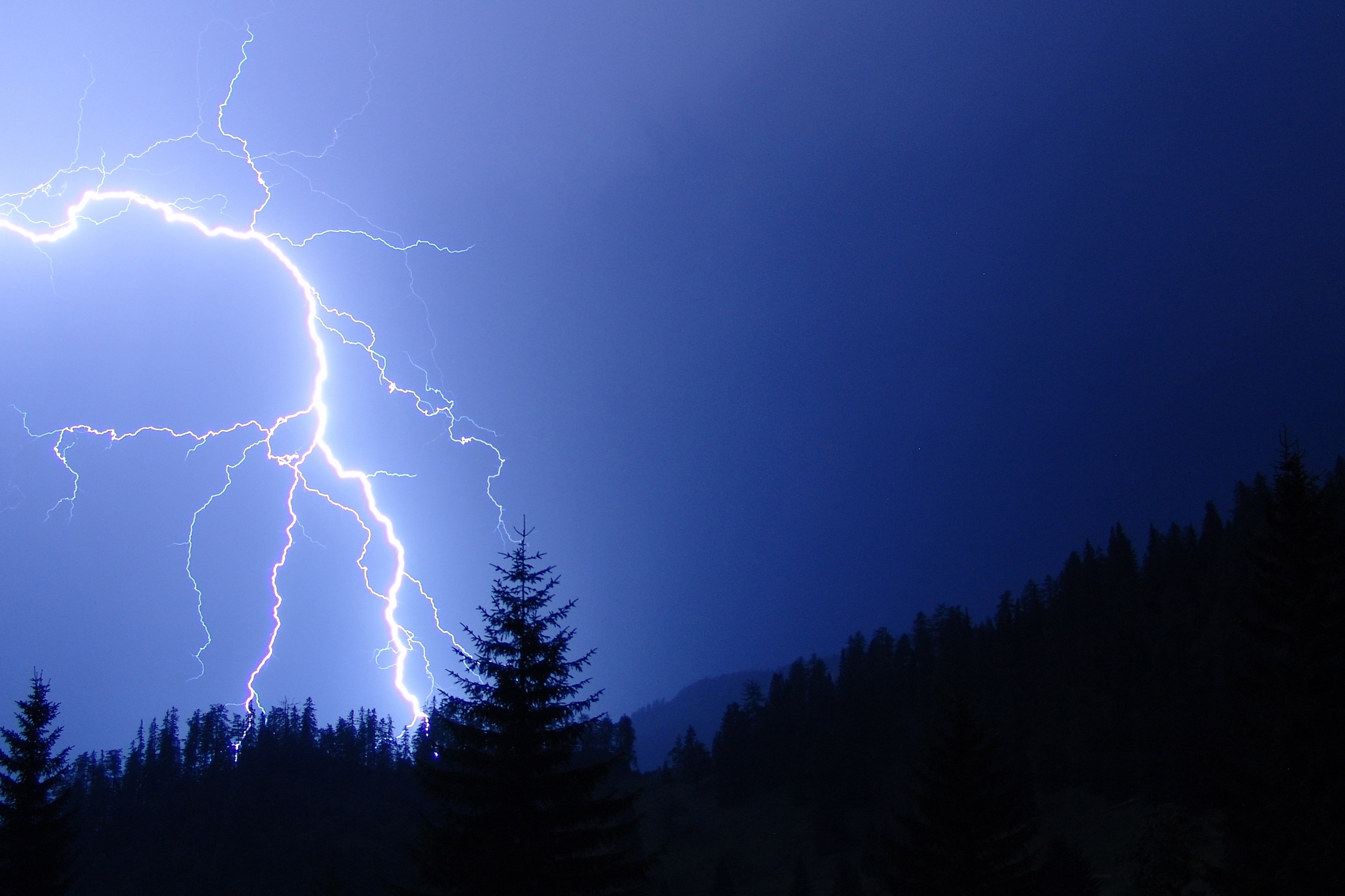 Blitz, Gewitter in den Bergen